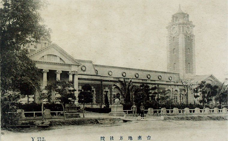 臺灣臺南地方法院 日治時期出版之繪葉書(名信片) in 1945以前 臺灣總督府